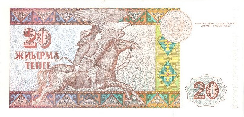 20 тенге 1993 года